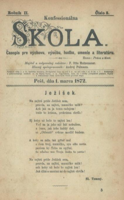 Titulný list periodika Konfessionálna škola, ktoré vychádzalo na Slovensku v 19. storočí.